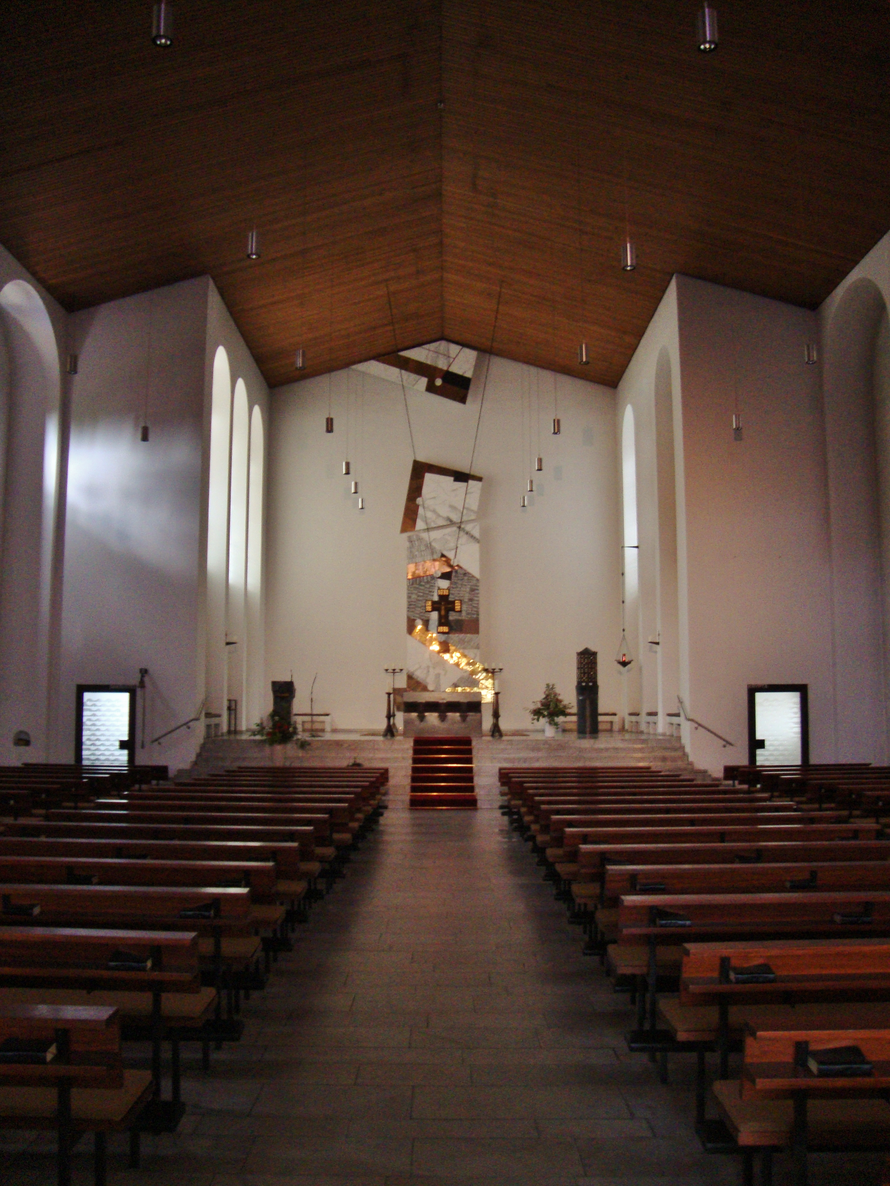 Röm.-kath. Kirche St. Joseph in Bonn-Castell, Ecke Graurheindorfer Straße/Kaiser-Karl-Ring: Inneres